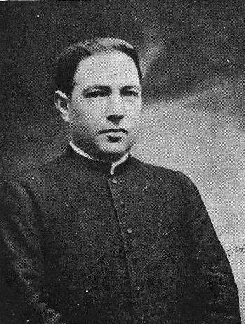 José Toubes, fotografía en Vida Gallega 1936